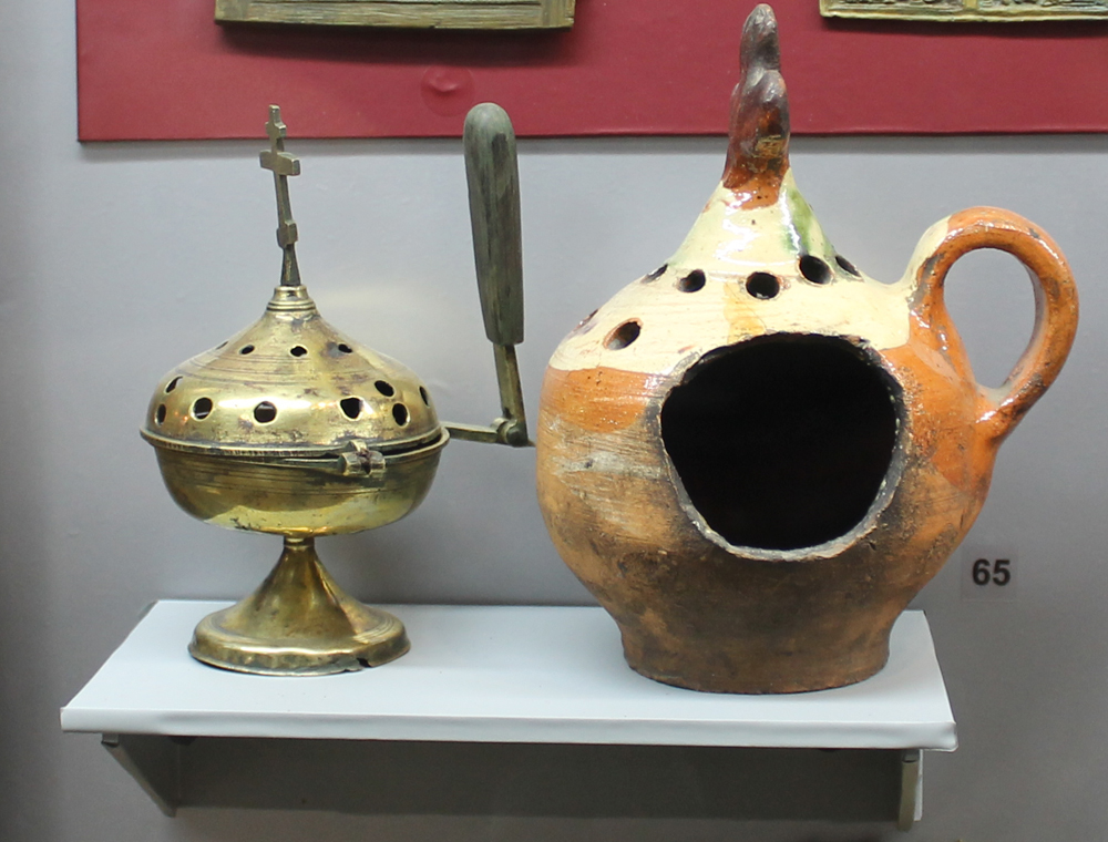 Кацея - старообрядческая кадильница. Шиловский краеведский музей